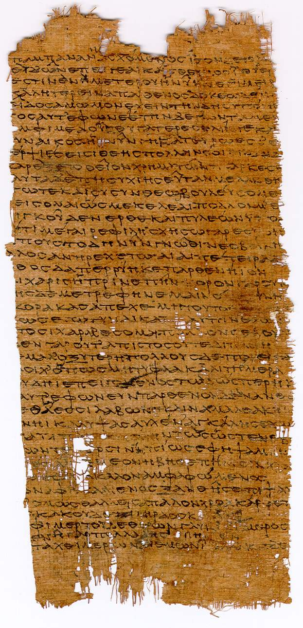 Fragment des Archilochos, Papyrussammlung Köln 7511 recto (verso unbeschrieben